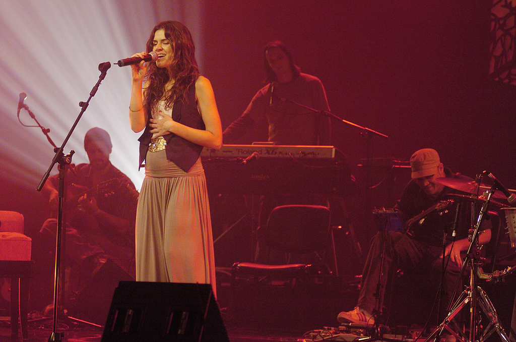 Show de Mariana Aydar e convidados no Auditório Ibirapuera. Dia 4 de maio. São Paulo 5 de maio de 2007. Brasil.